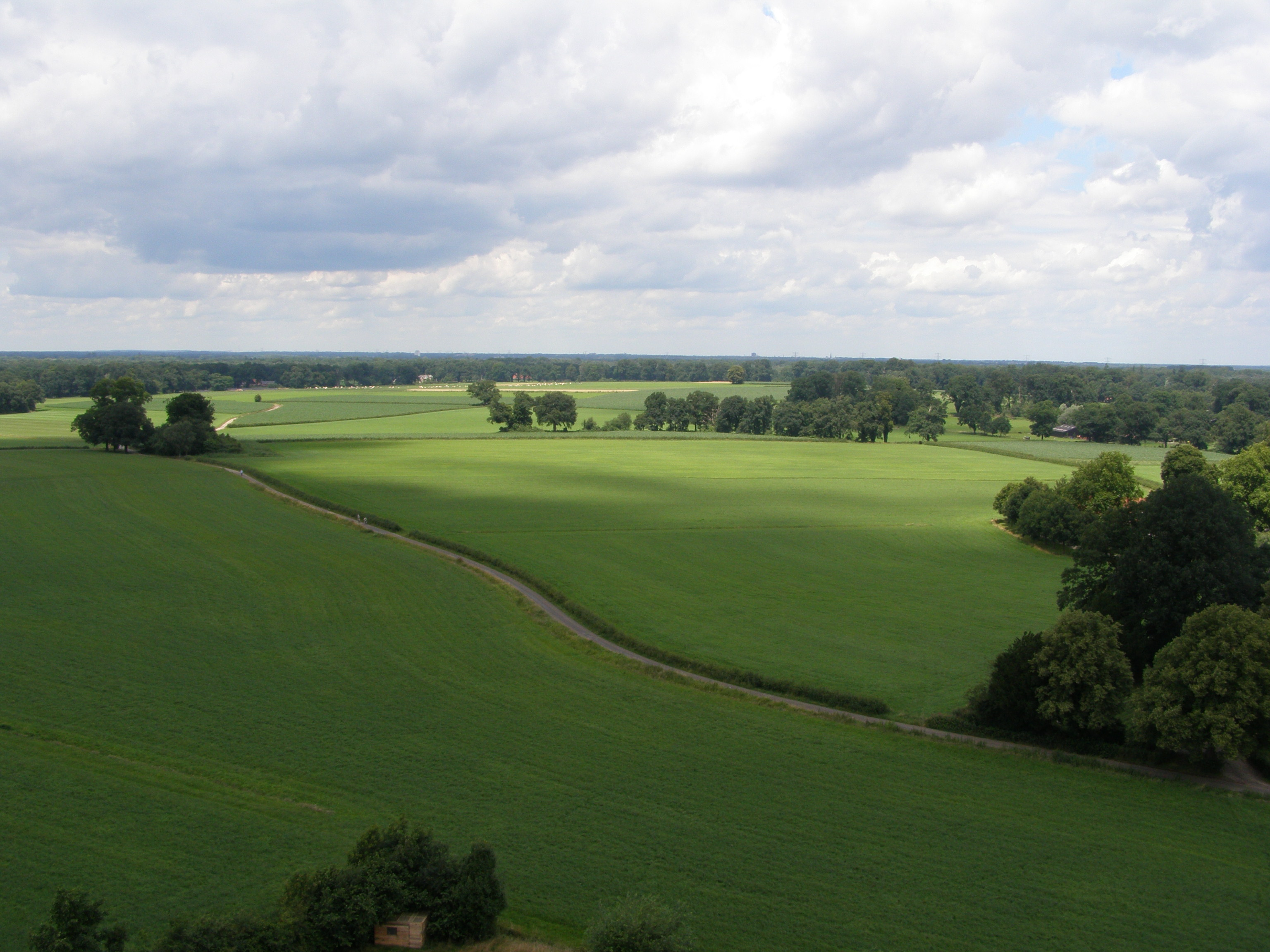 eigen werk